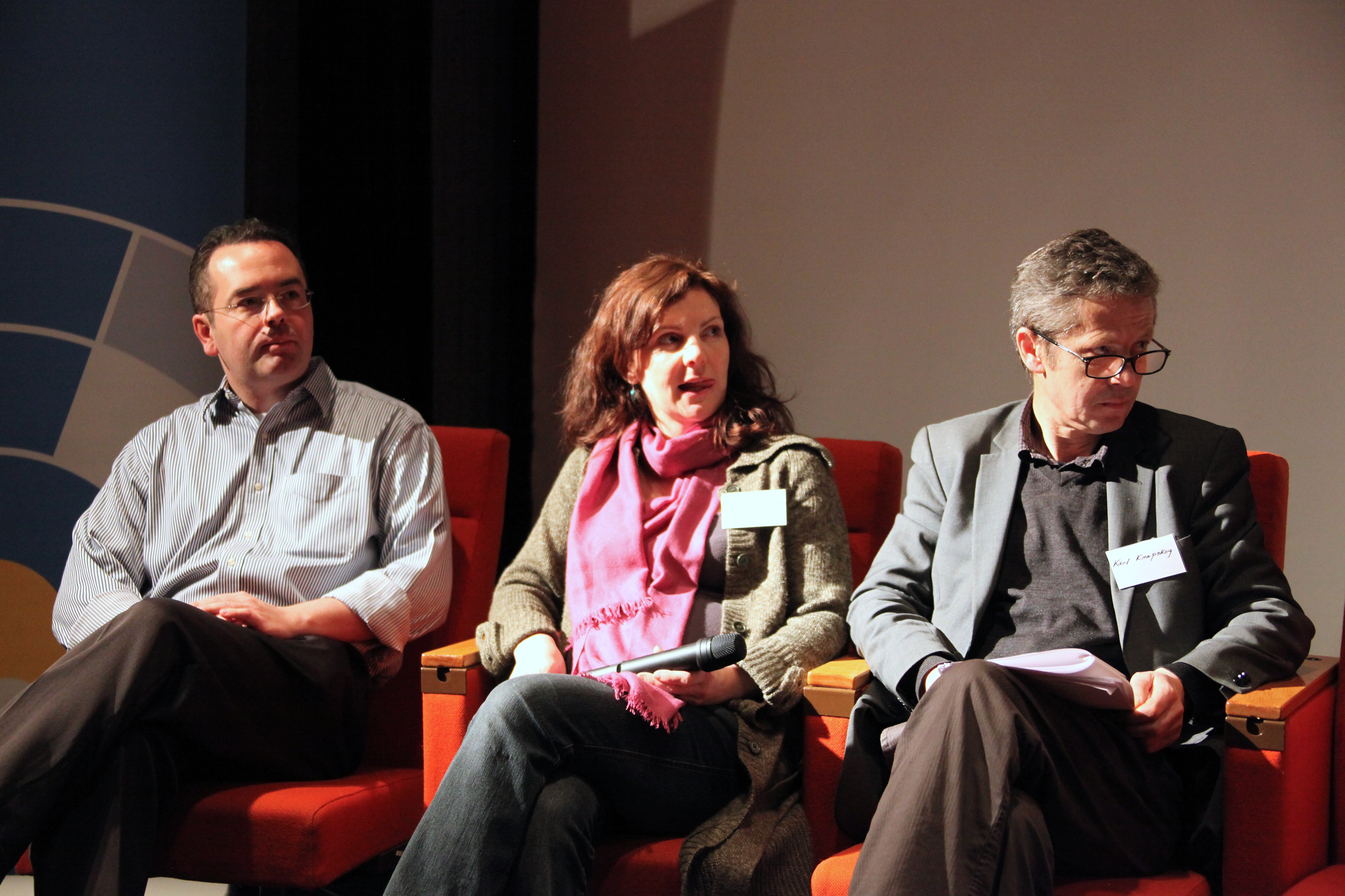 Wikipedia Academy